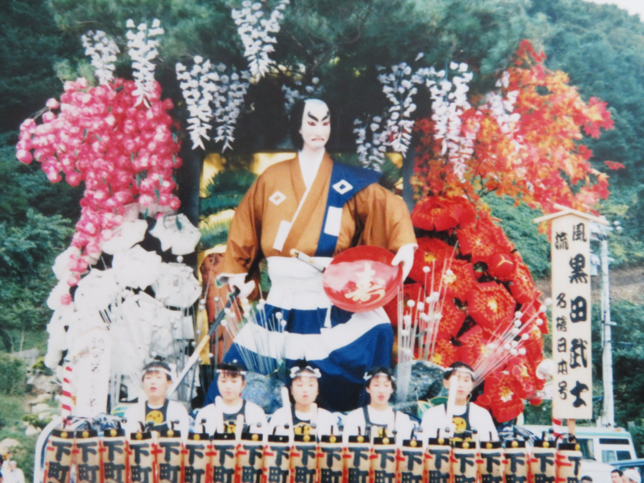 葛巻・下町組